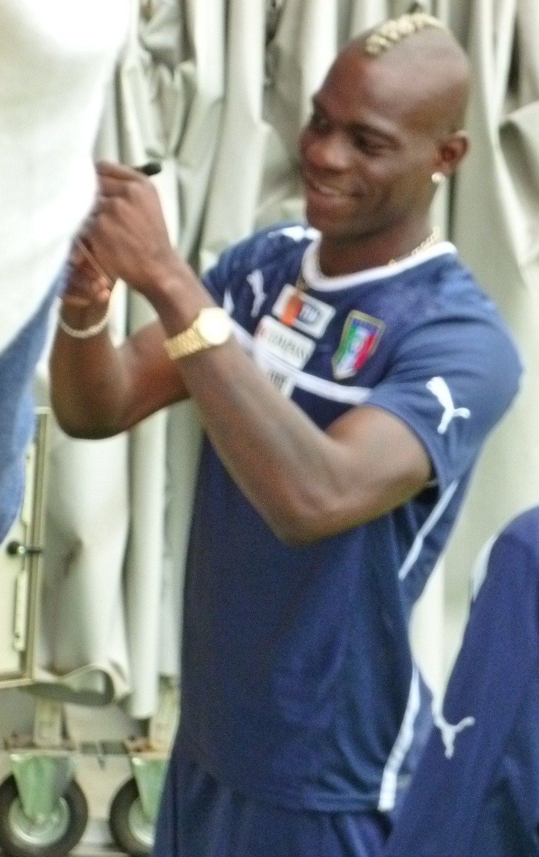 Mario Balotelli a Euro 2012 firma autografi